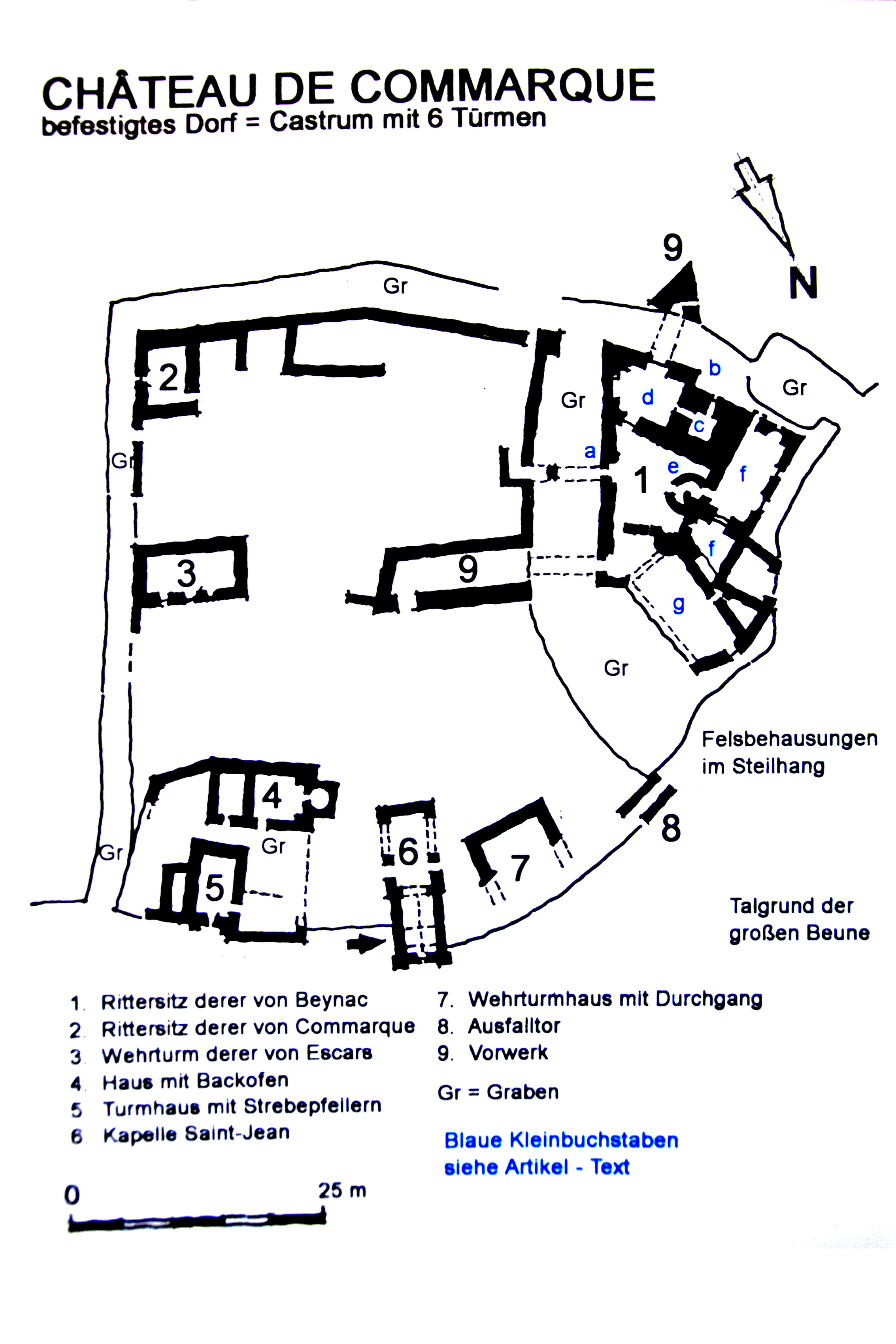 Château der Commaque, Lageplan